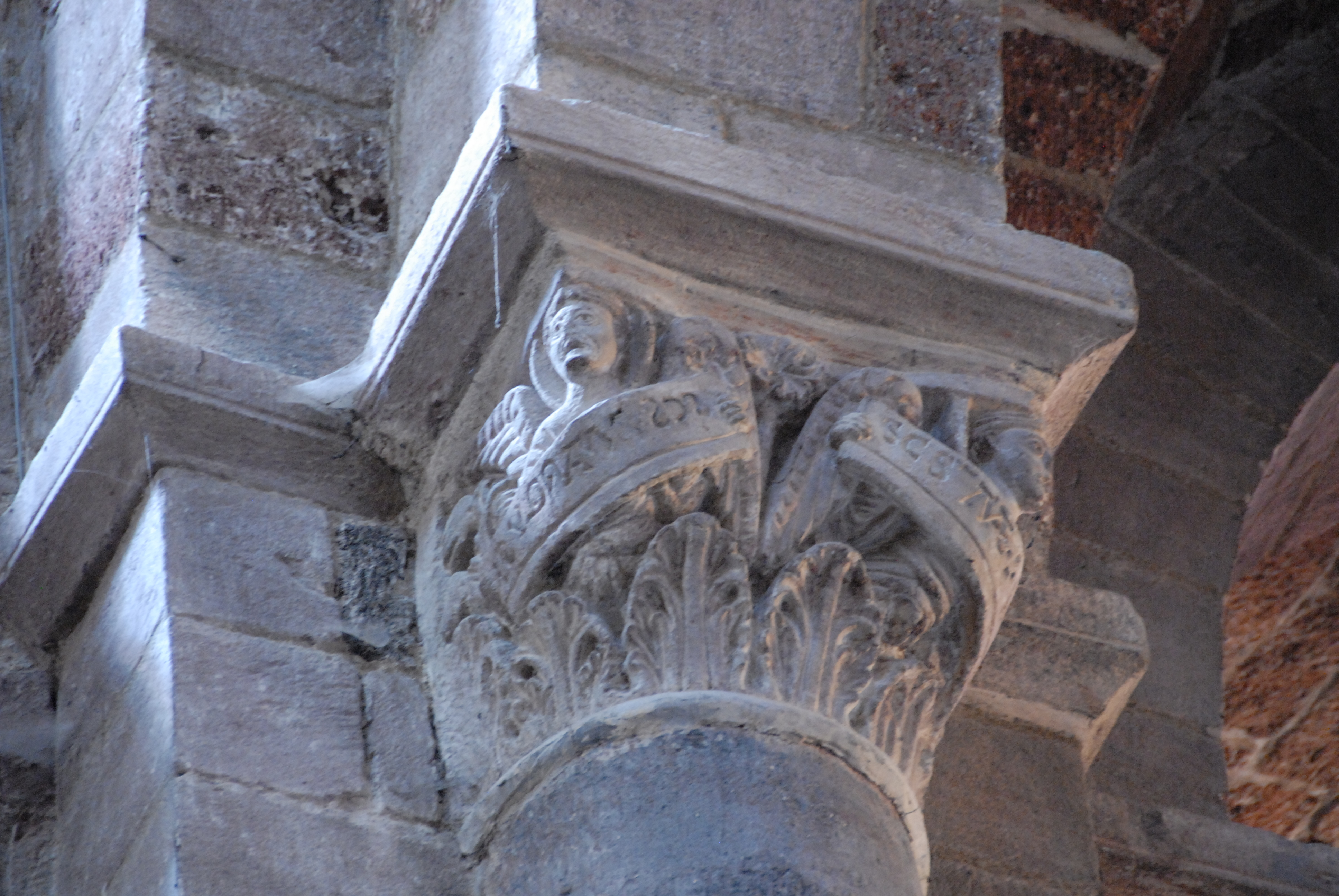 St.-Julien Brioude, Kapitell, Evangelistenengel, SCS MARCUS, SCS MATEUS